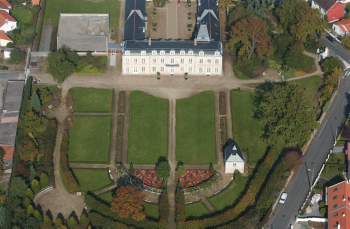 Château de la Balinière à Rezé